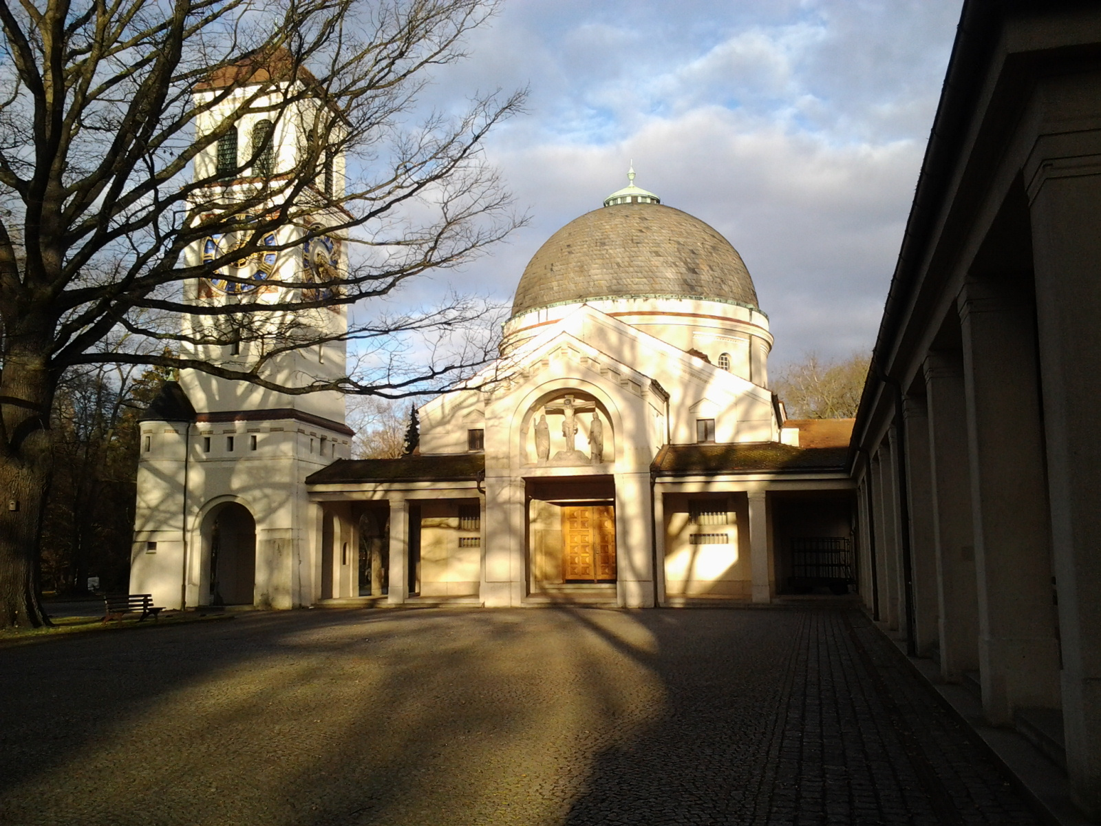 Aussegnungshalle und Glockenturm auf dem Südfriedhof in Nürnberg.